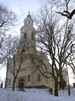 Szent Kereszt felmagasztalása római katolikus templom, Hőgyész This is a photo of a monument in Hungary. Identifier: 8633